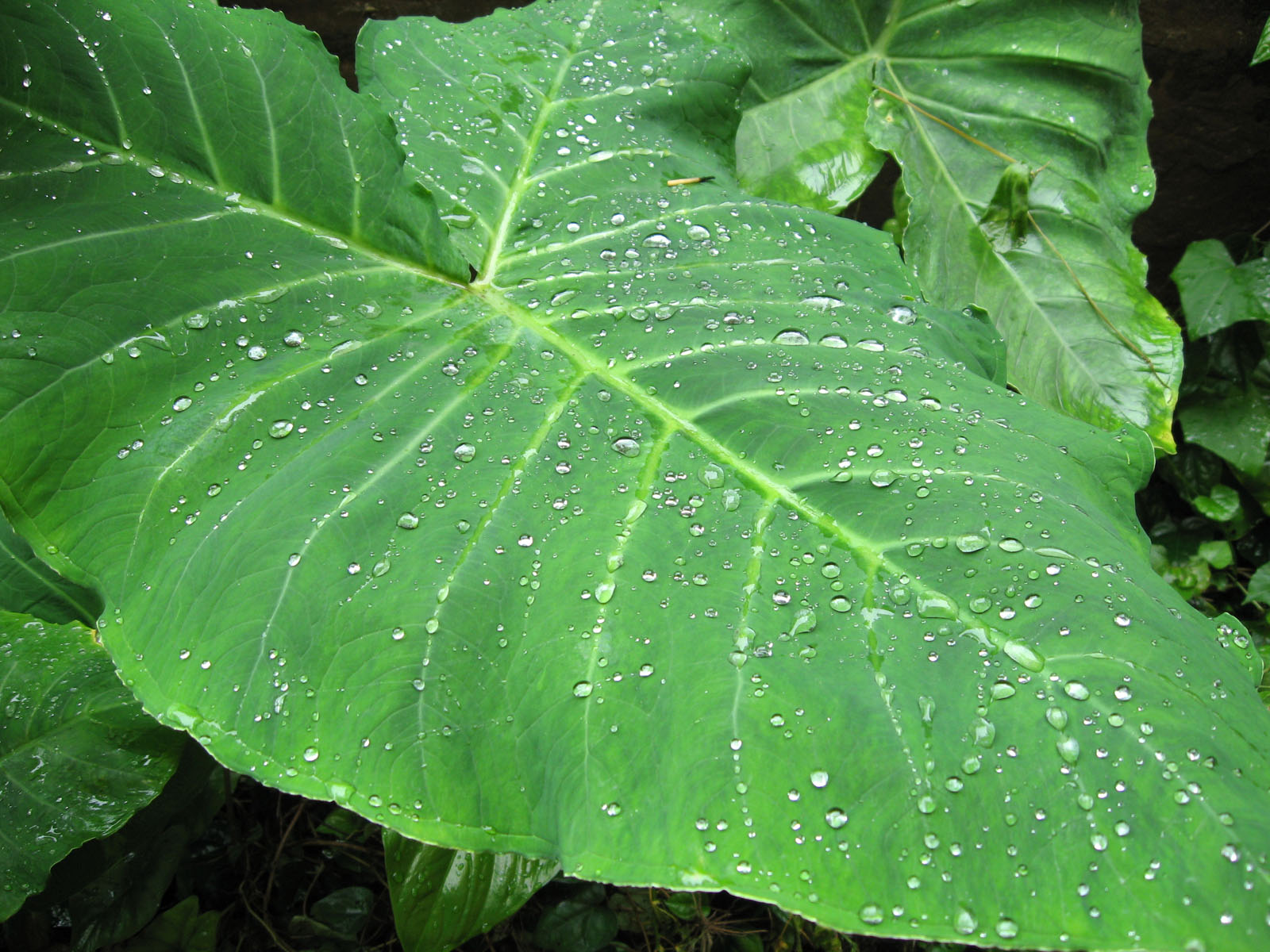 কচুপাতা.